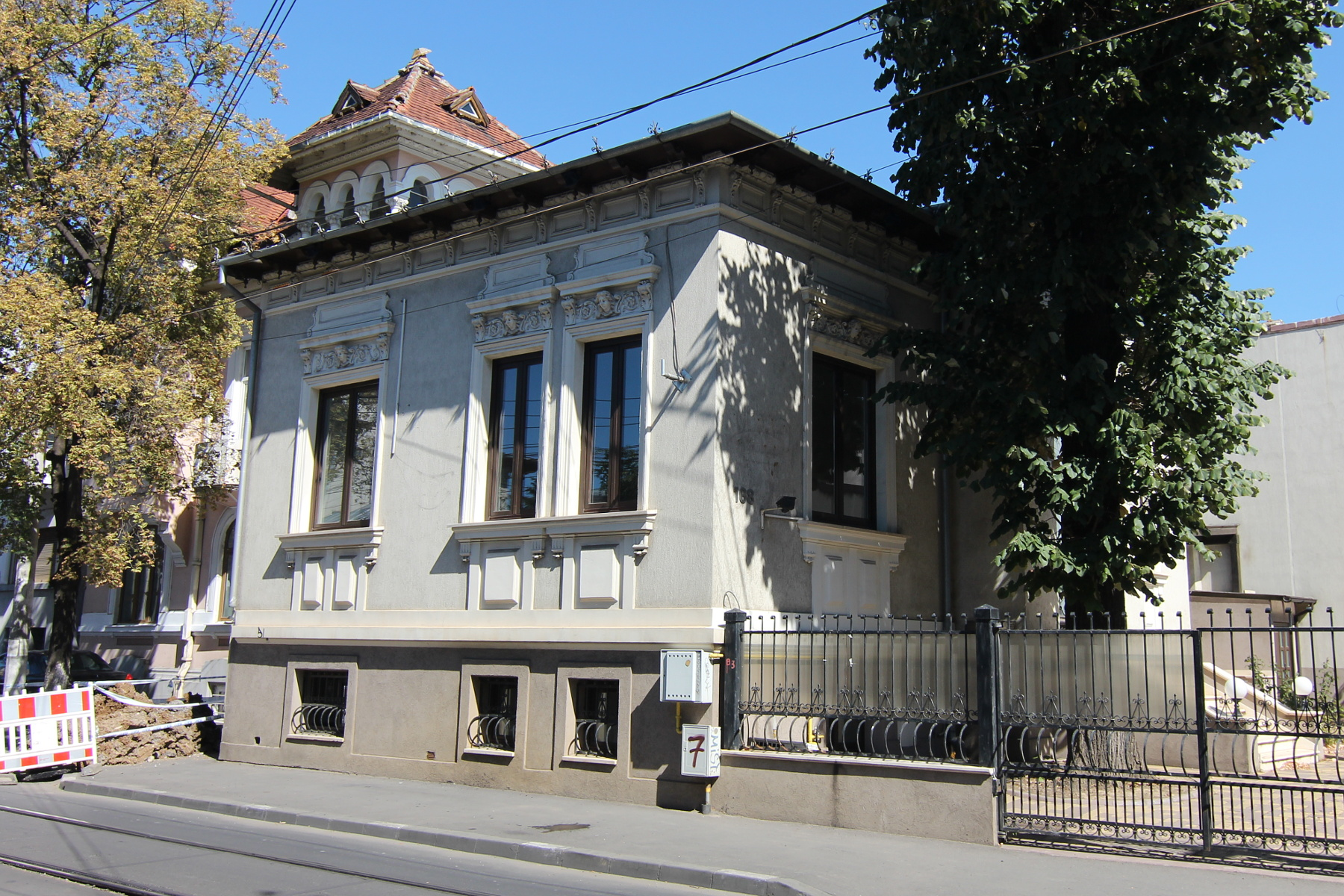 Casă pe strada Traian